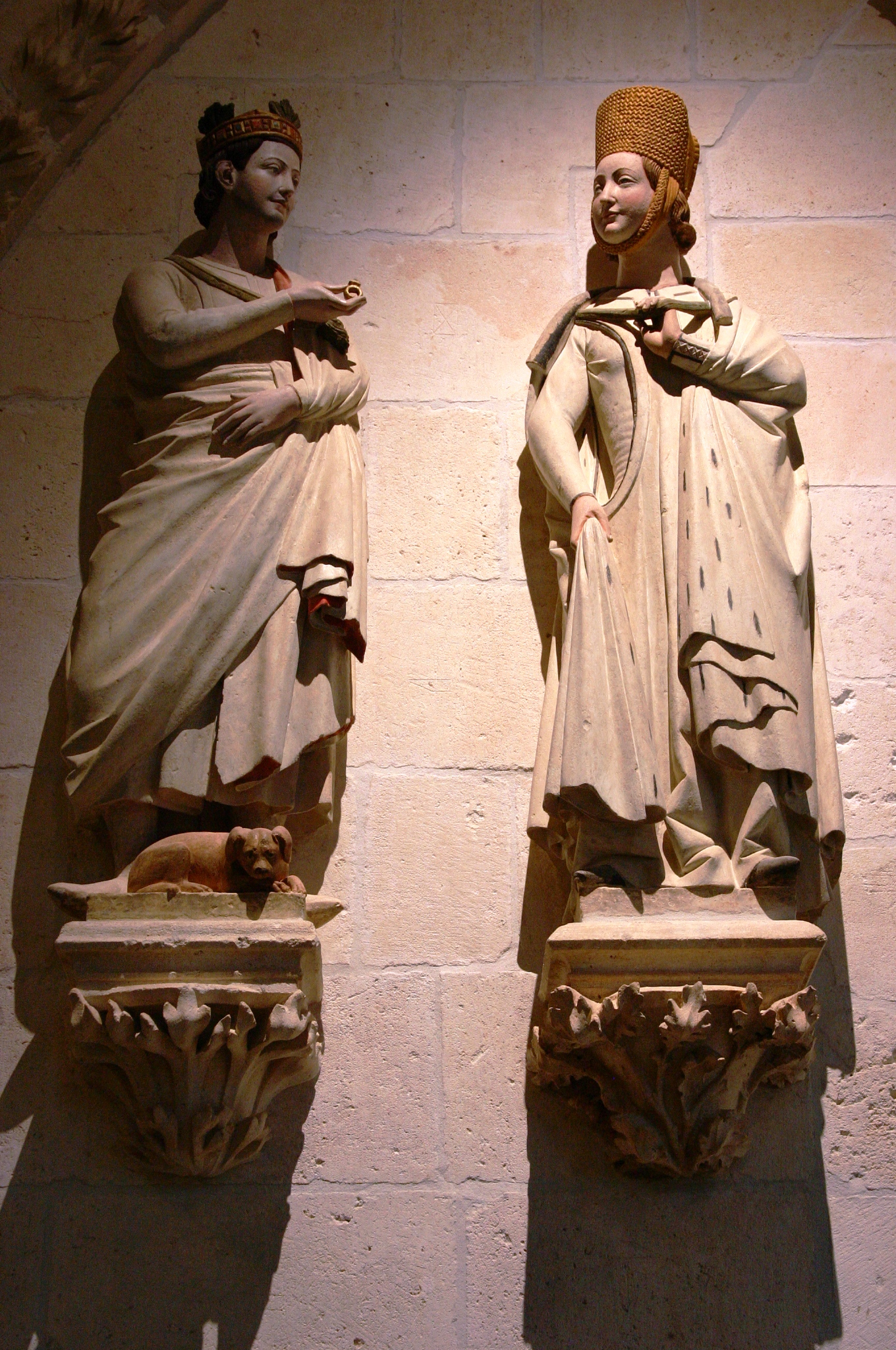 Interior da Catedral